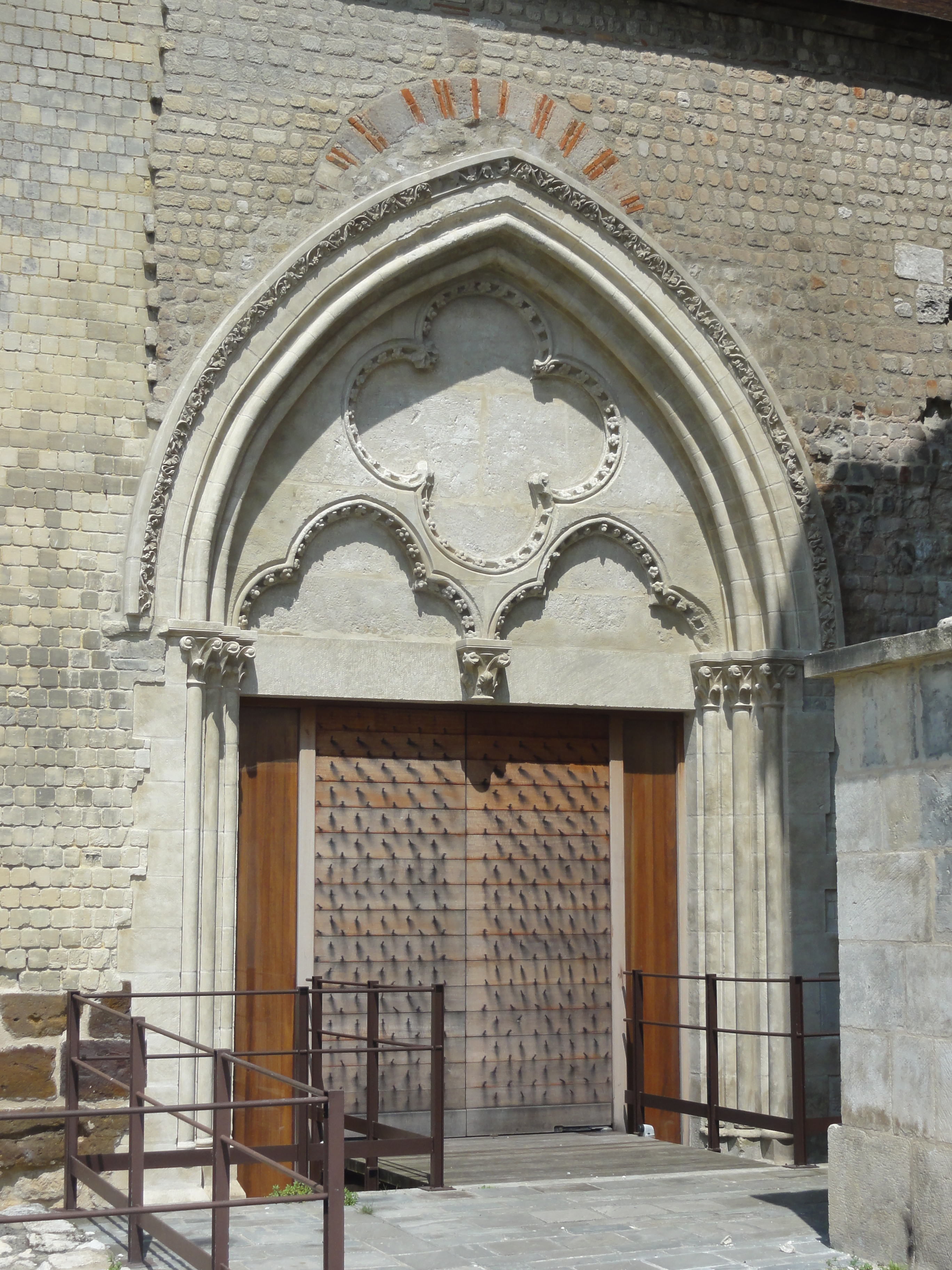 Portail sud.